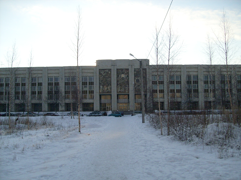 Математико-механический факультет СПбГУ